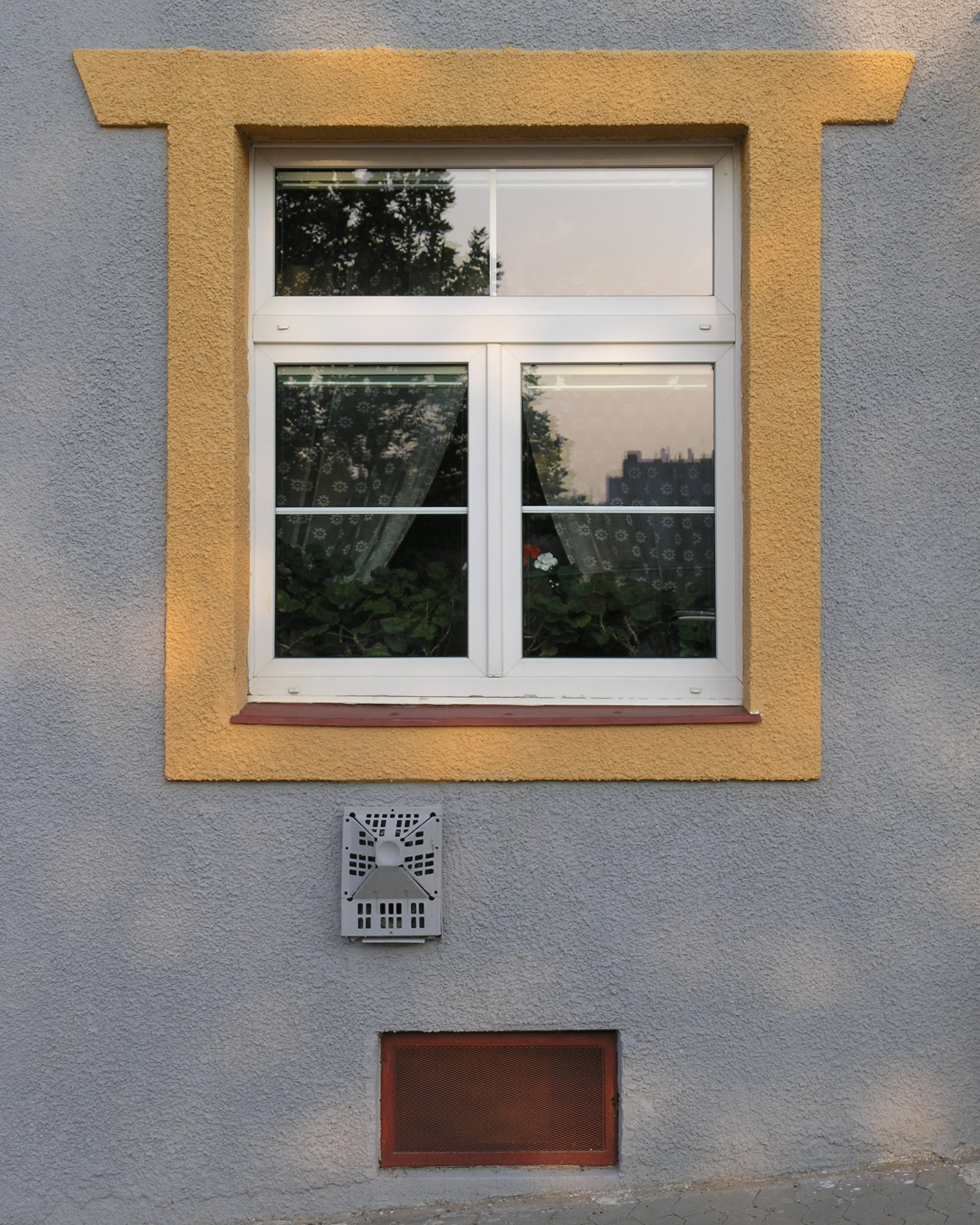 Praha, Střešovice - ulice Na Malovance